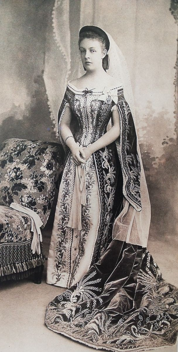 Баронесса Мария Ивановна Велио (1875—после 1930), фрейлина двора.